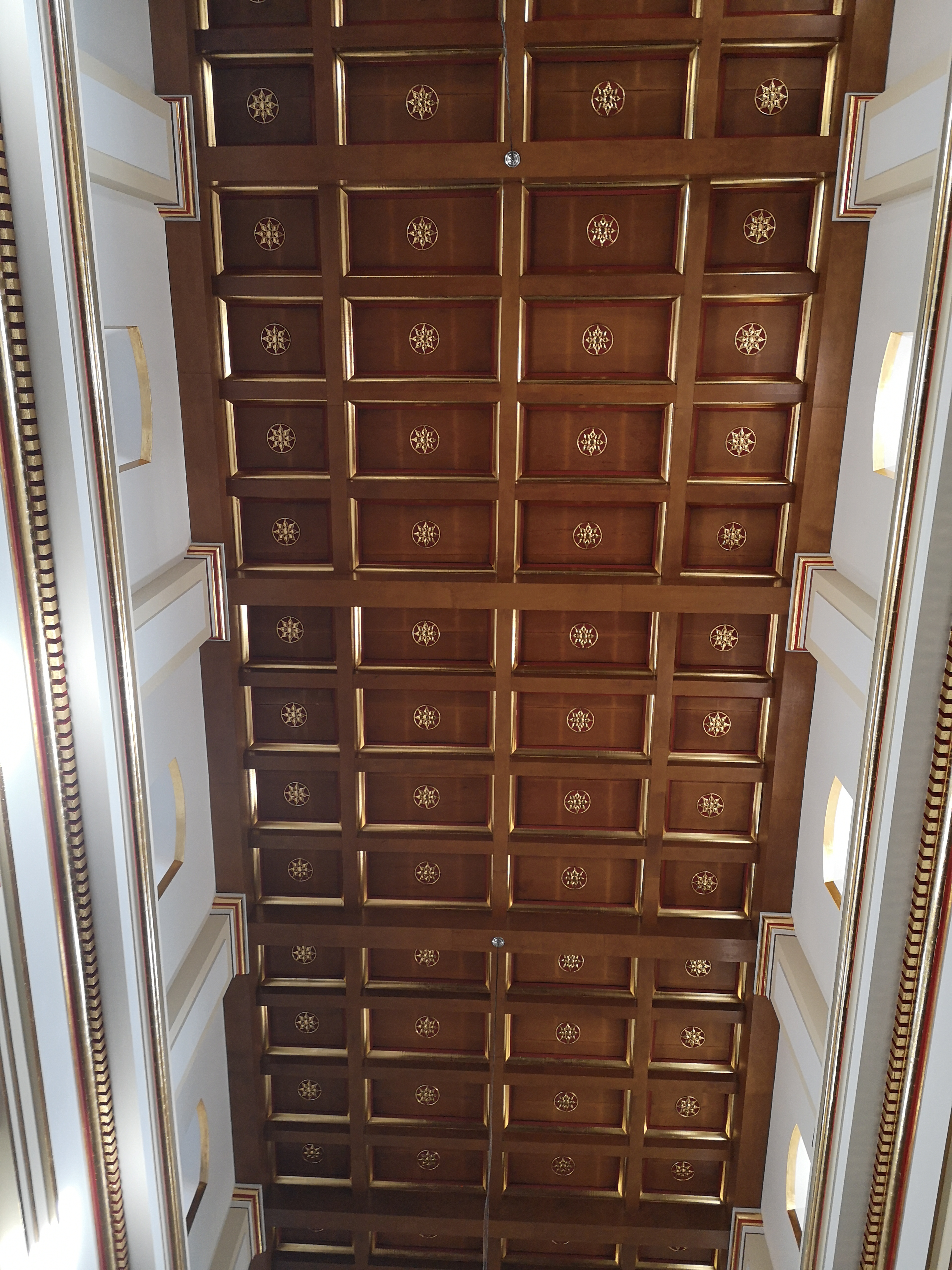 Catedral de Santa Rosa de Osos